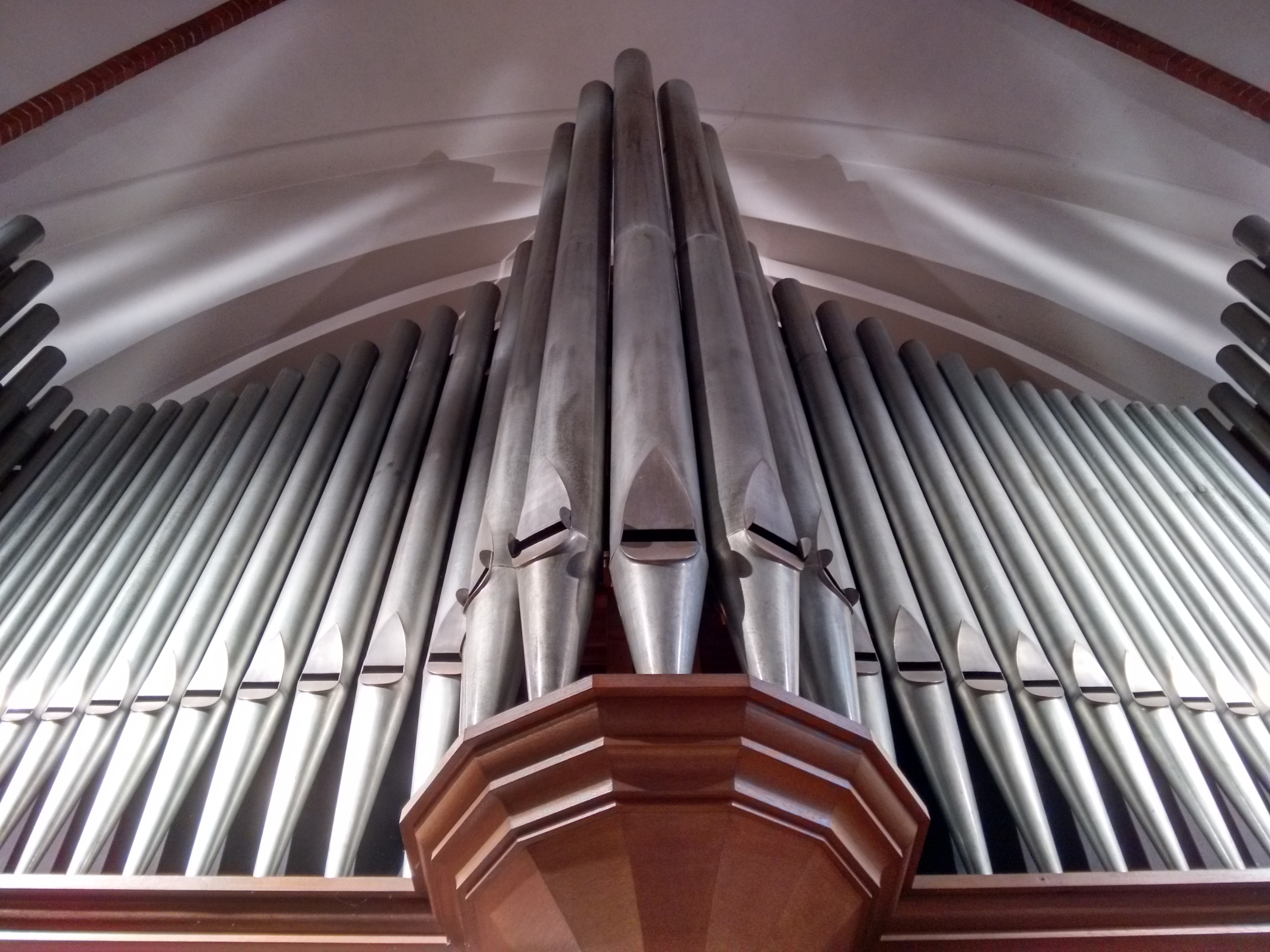 Orgelpfeifen der Führer-Orgel in der Ev.-ref. Kirche in Bremen-Blumenthal